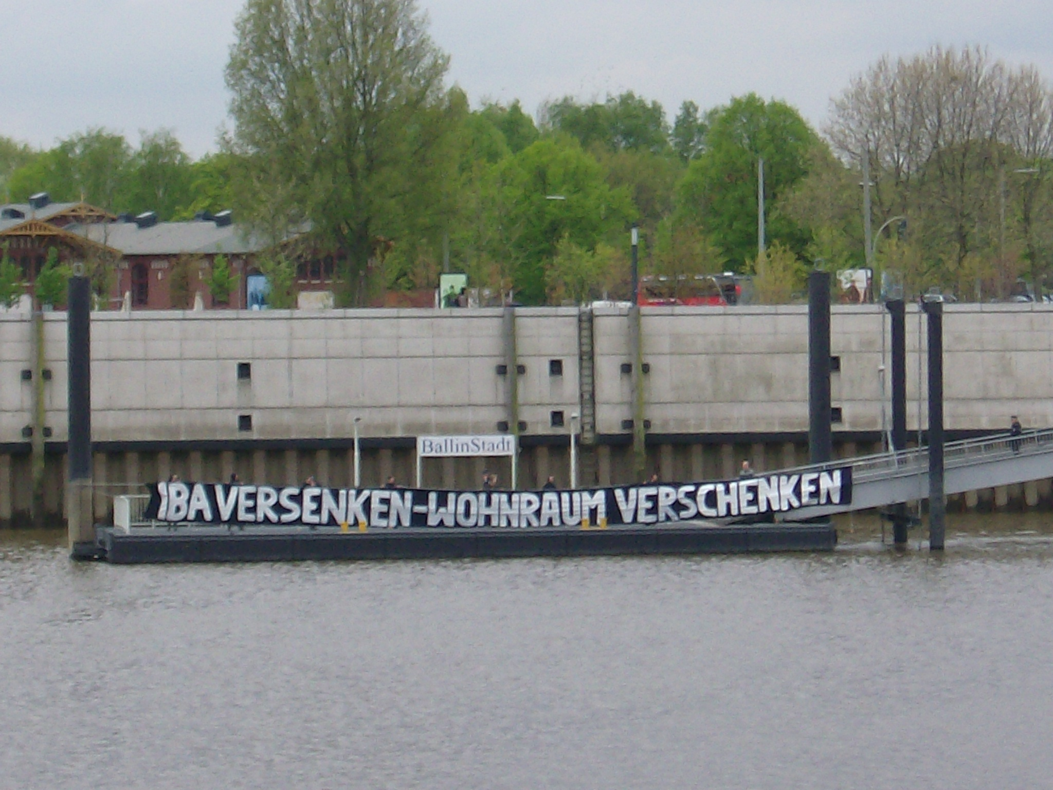 Protesttransparent zur Eröffnung des IBA-Docks am Fähranleger "Ballin Stadt".